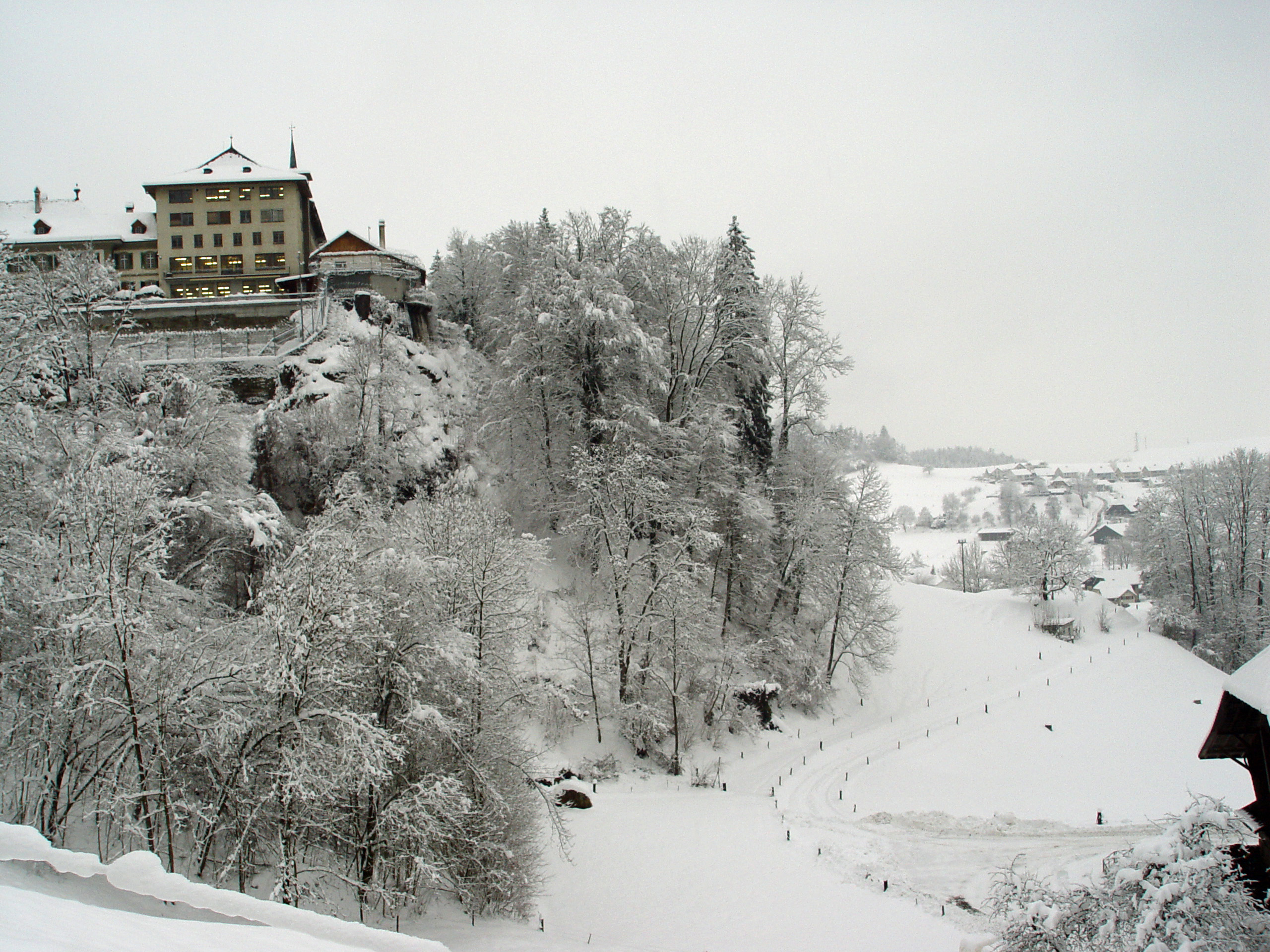 Strafanstalt Thorberg im Winter.